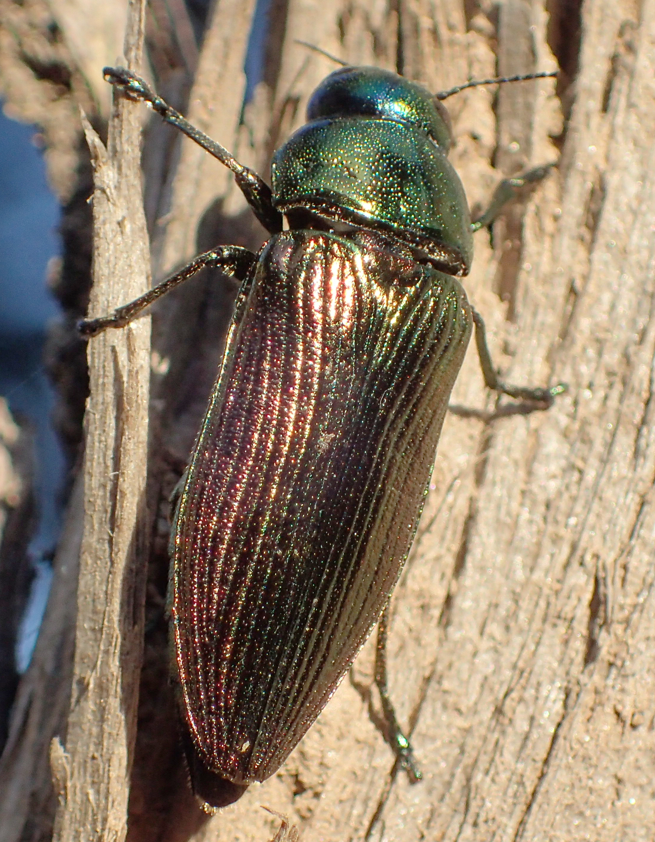 Eurythyrea austriaca von Griechenland, Peloponnes, bei Kosmas